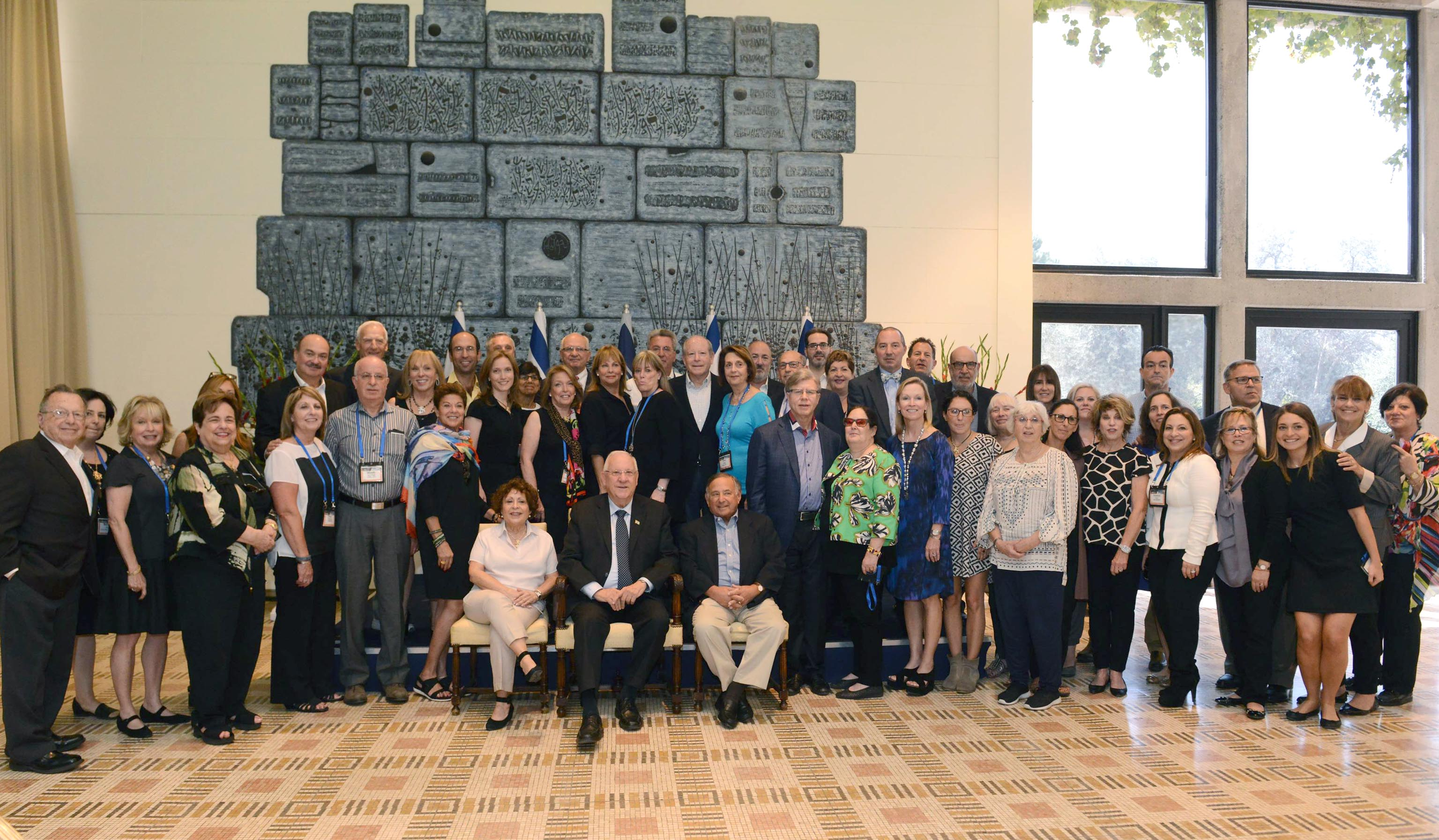 משלחת הפדרציות היהודיות בצפון אמריקה (JFNA) עם נשיא מדינת ישראל ראובן ריבלין